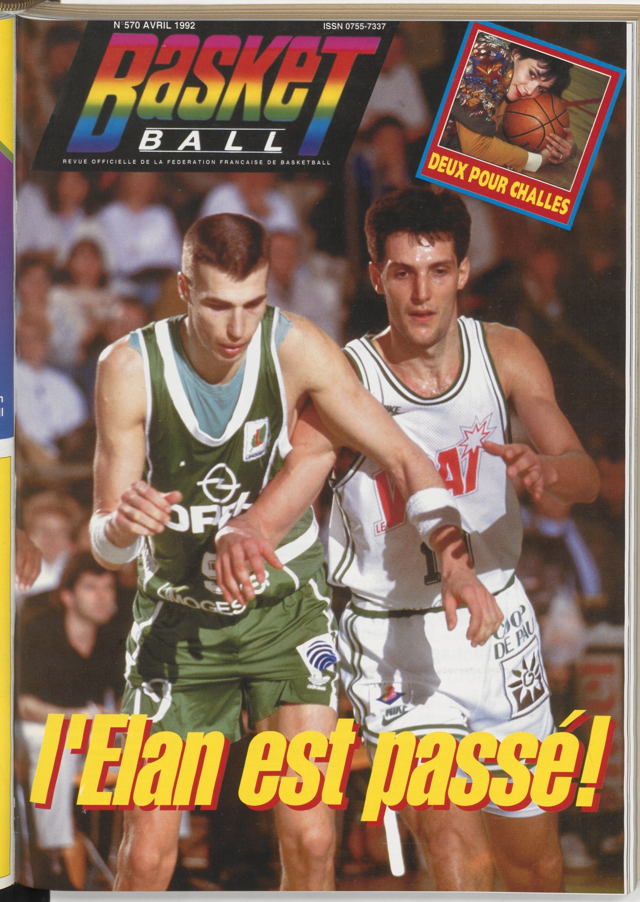 Didier Gadou en 1992 avec Pau-Orthez, face à Stéphane Ostrowski.